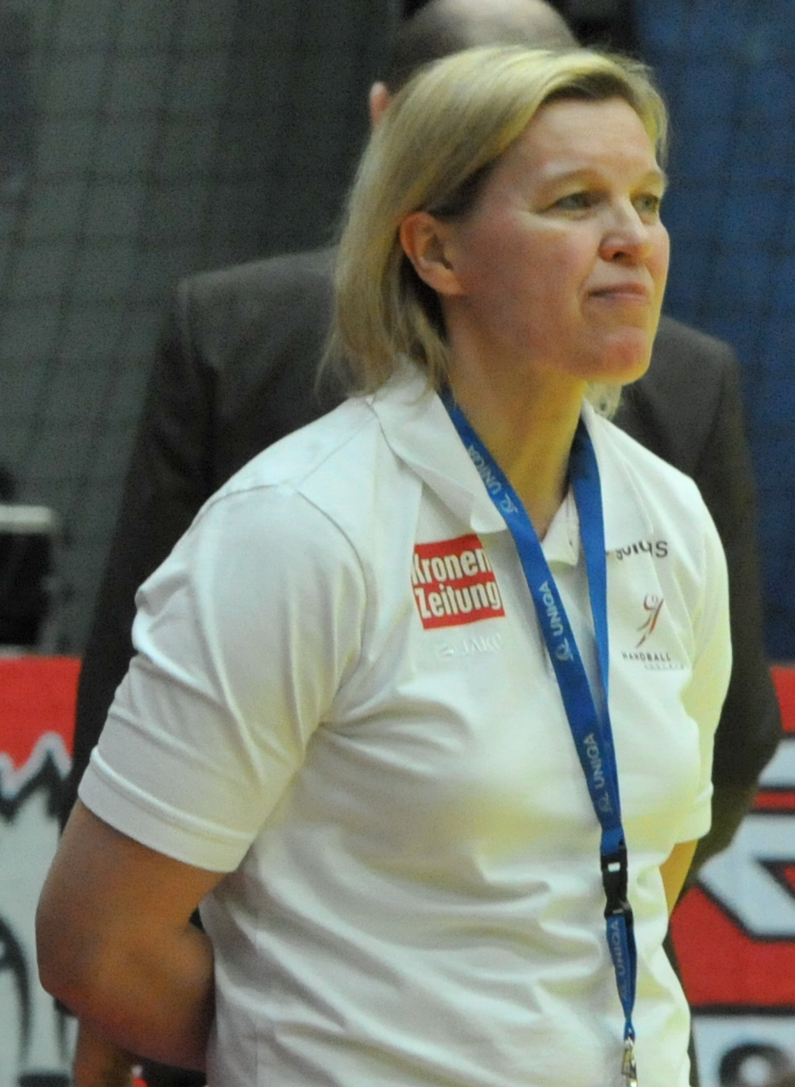 Ausra Fridrikas, Trainerin des österreichischen Handball-Nationalteams der Frauen Jahrgang '96, beim Testspiel gegen die Slowakei am 4. März 2014